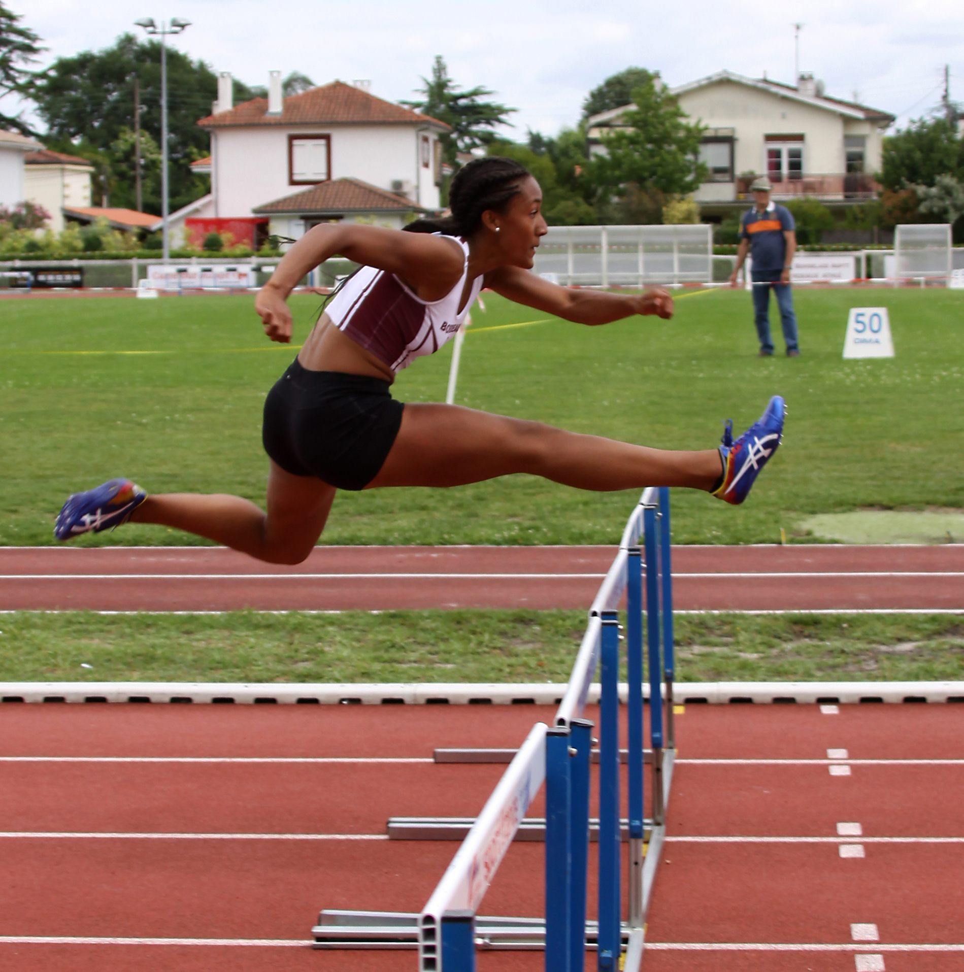 Solène Ndama à Bordeaux en 2017.